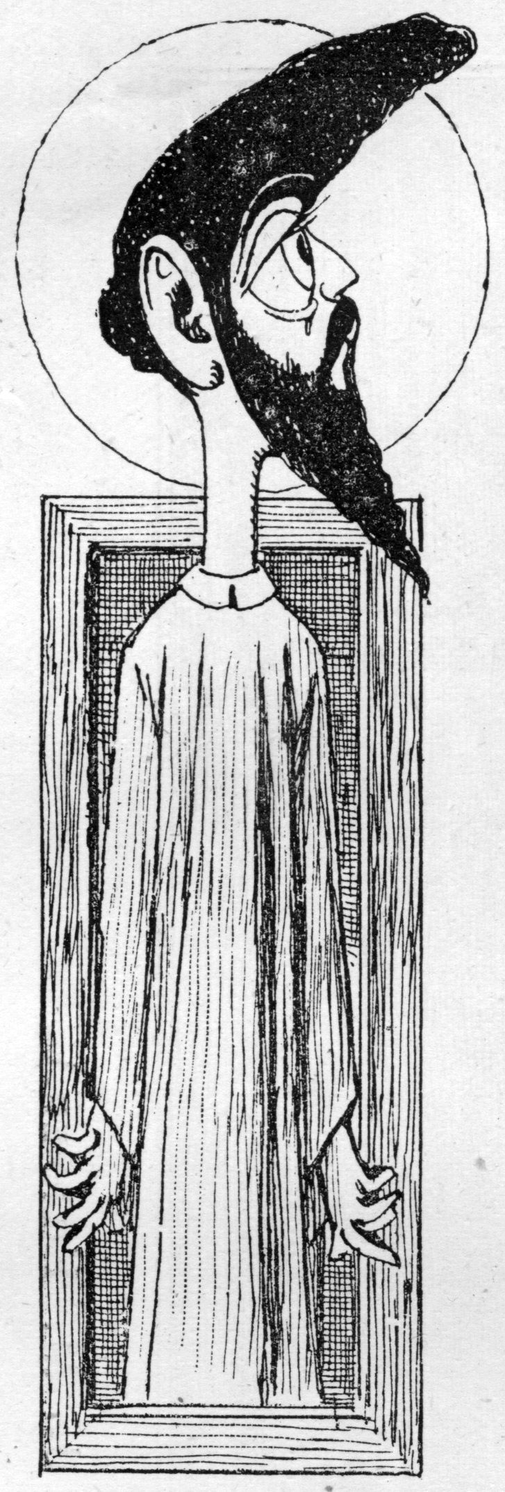 Le Portrait de Joséphin Peladan par Alexandre Séon au Salon des Rose-Croix de 1892